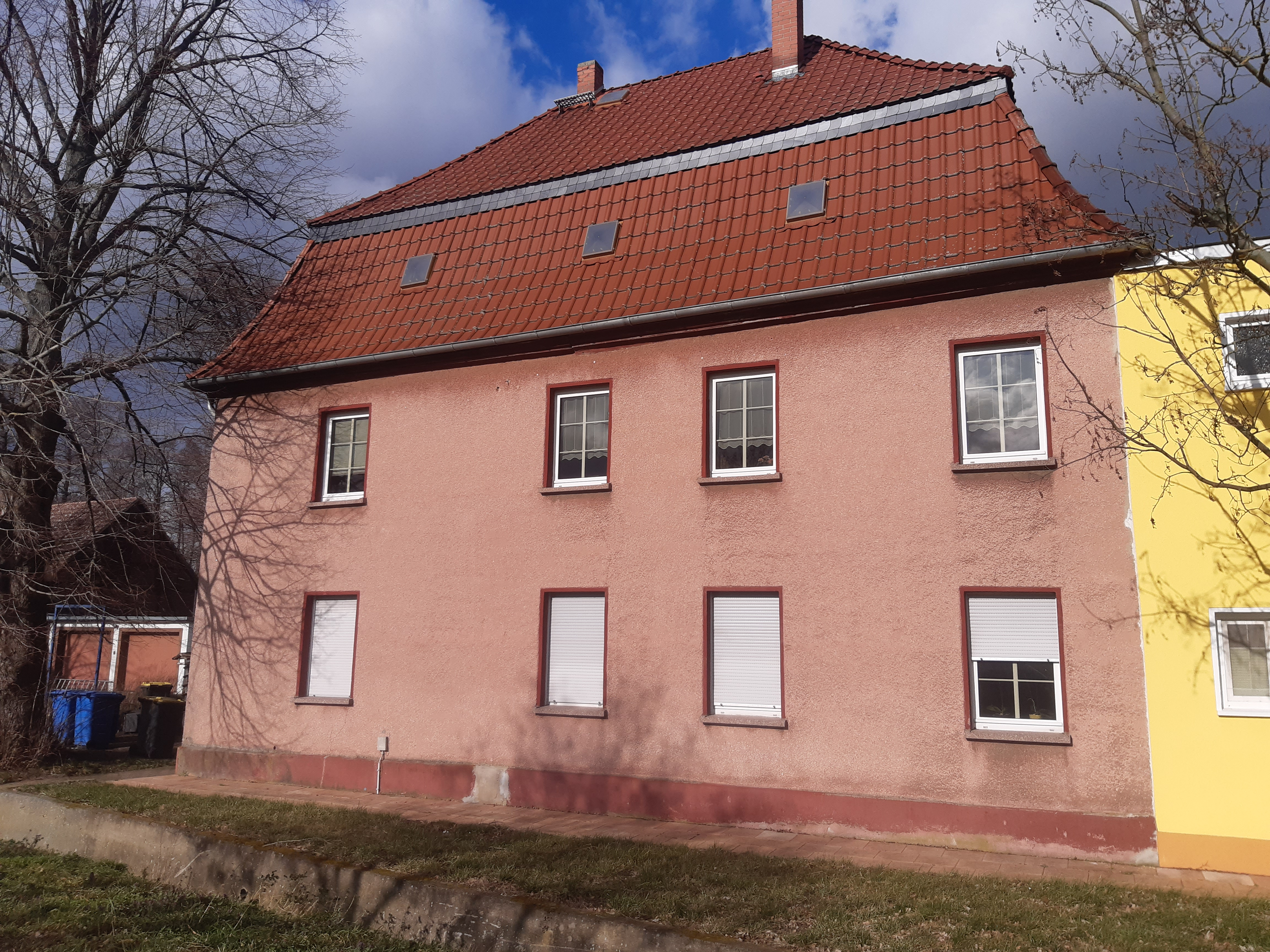 Mühlenhof